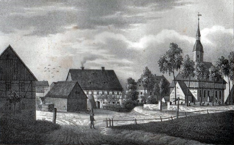 Die Wehrgangkirche in Mittelsaida, Ansicht von 1838 nach einer Grafik von J. Moeckel